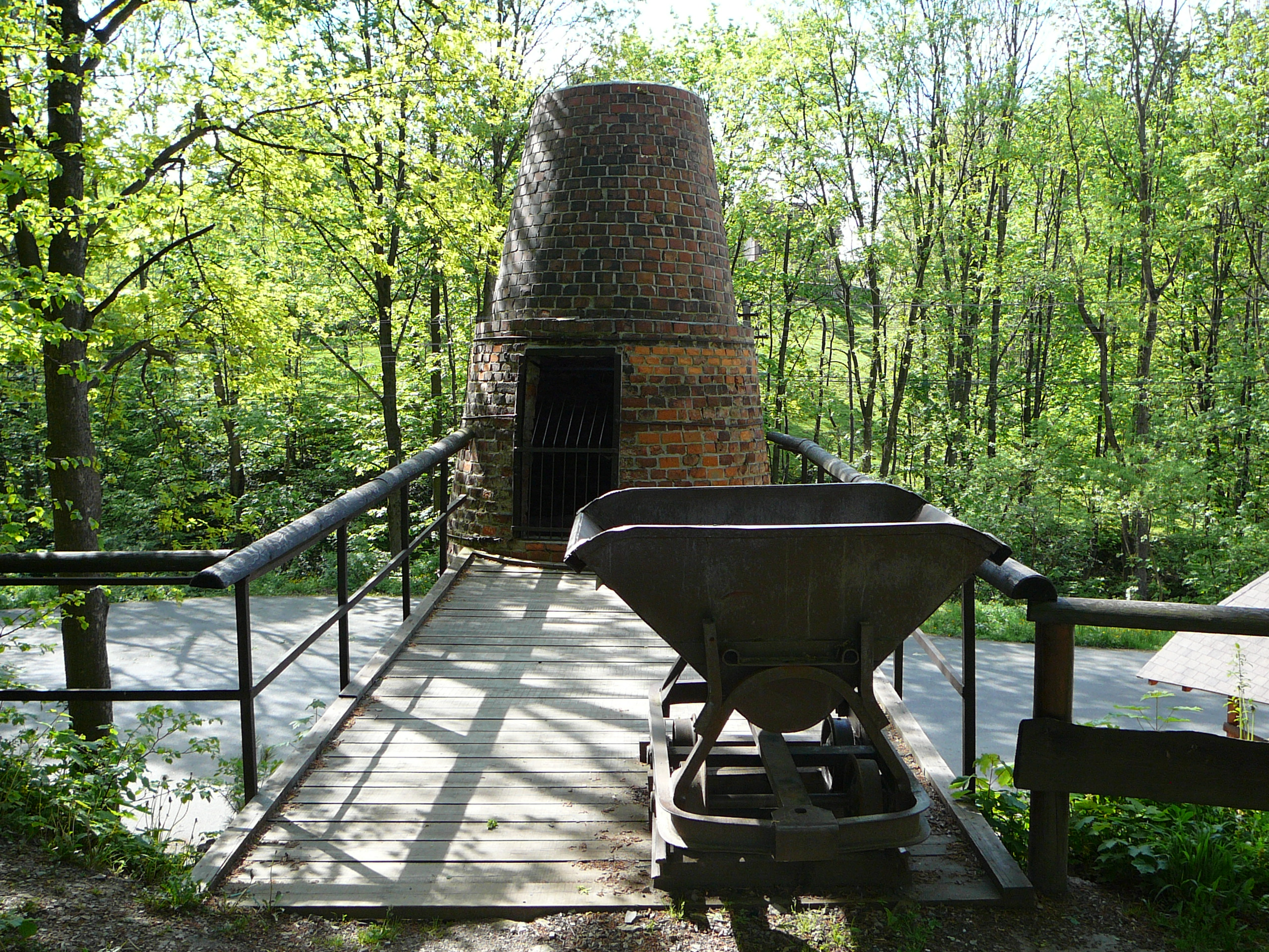 Rampa